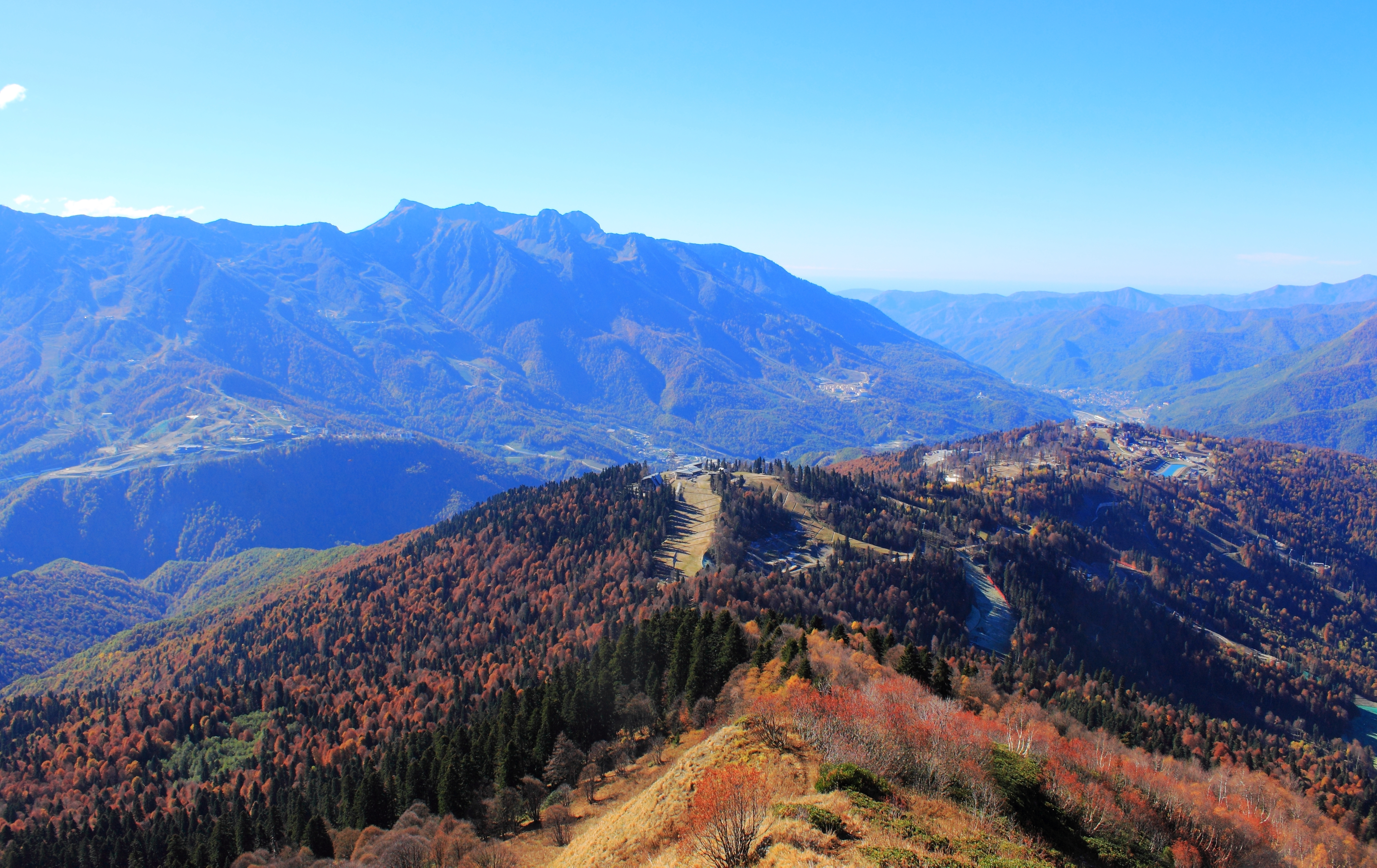 Вид на хребет Псекохо и долину реки Мзымта в окрестностях Красной Поляны. Территория Сочинского национального парка. Сочинский национальный парк расположен на южном склоне Большого Кавказа в Краснодарском крае. This image is related to the protected area of Russia number 2300430